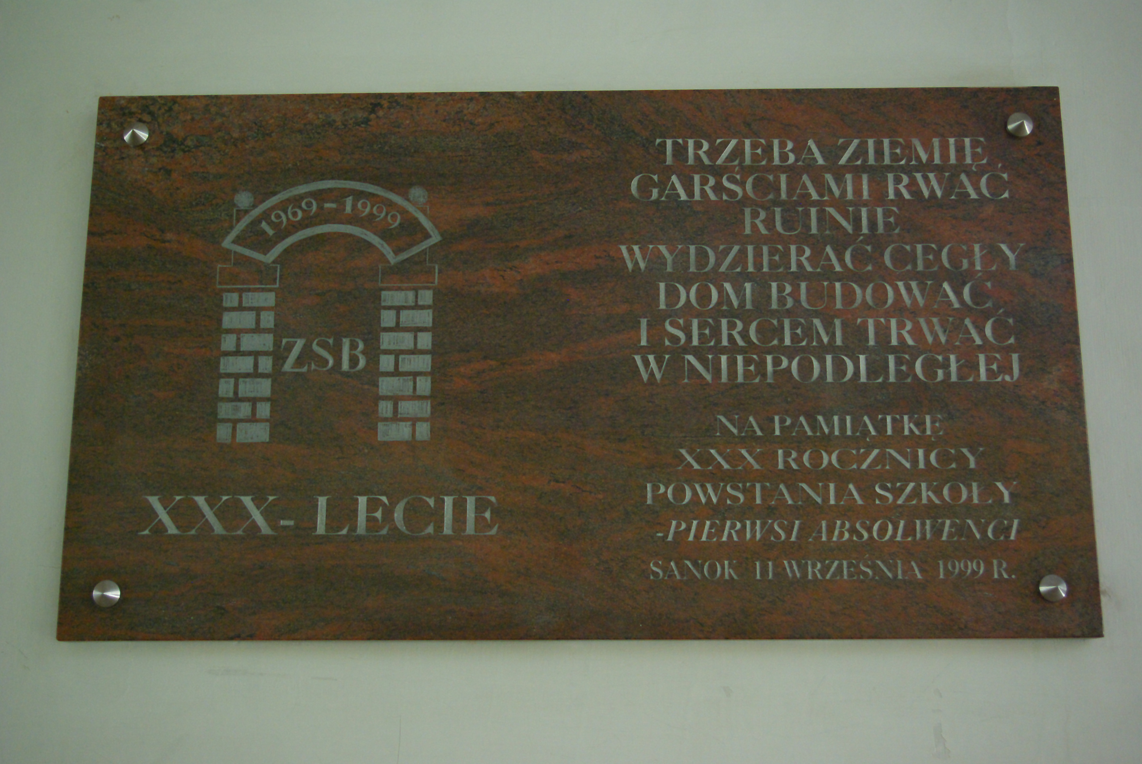 Zespół Szkół nr 4 im. Króla Kazimierza Wielkiego w Sanoku. Tablica pamiątkowa